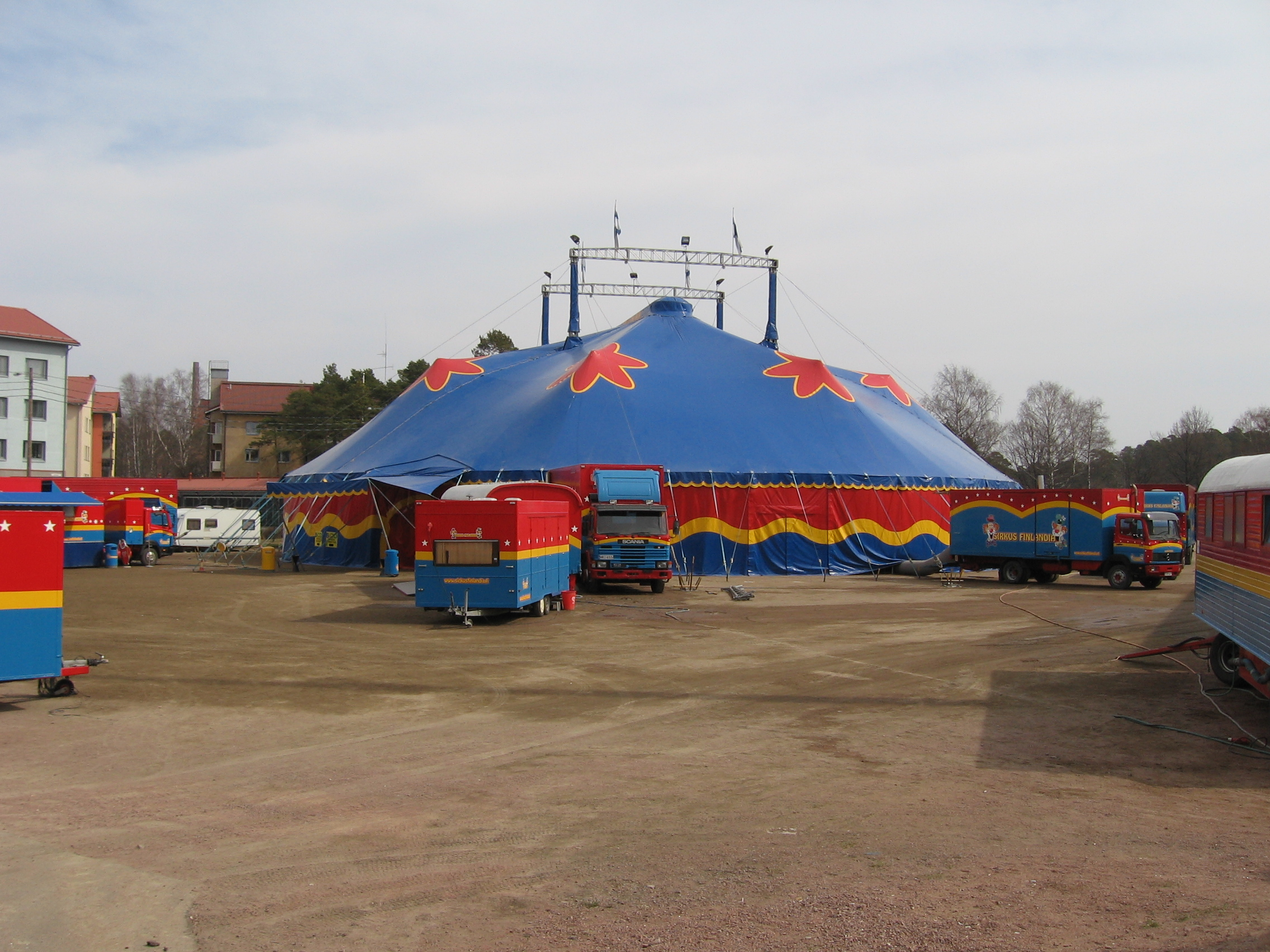 Sirkus Finlandian esiintymisteltta ja kuljetuskalustoa.